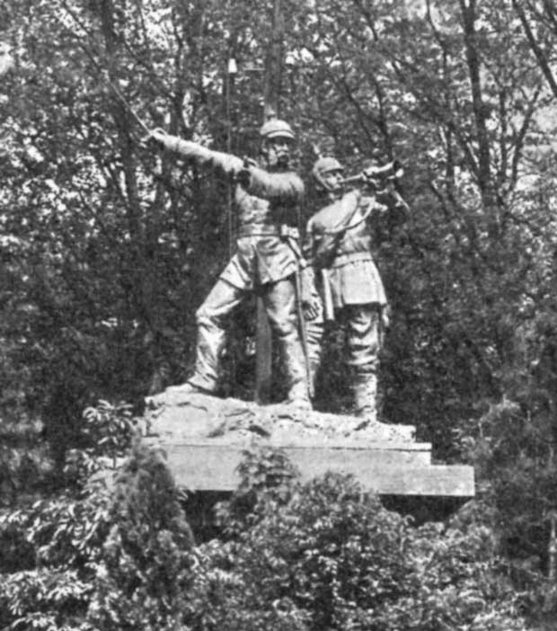 Figurengruppe „Bruno von François mit Trompeter“ nach einem Bildnis von Anton von Werner gestaltet 1895 von Wilhelm Schneider im Volksgarten Saarbrücken-St. Johann.